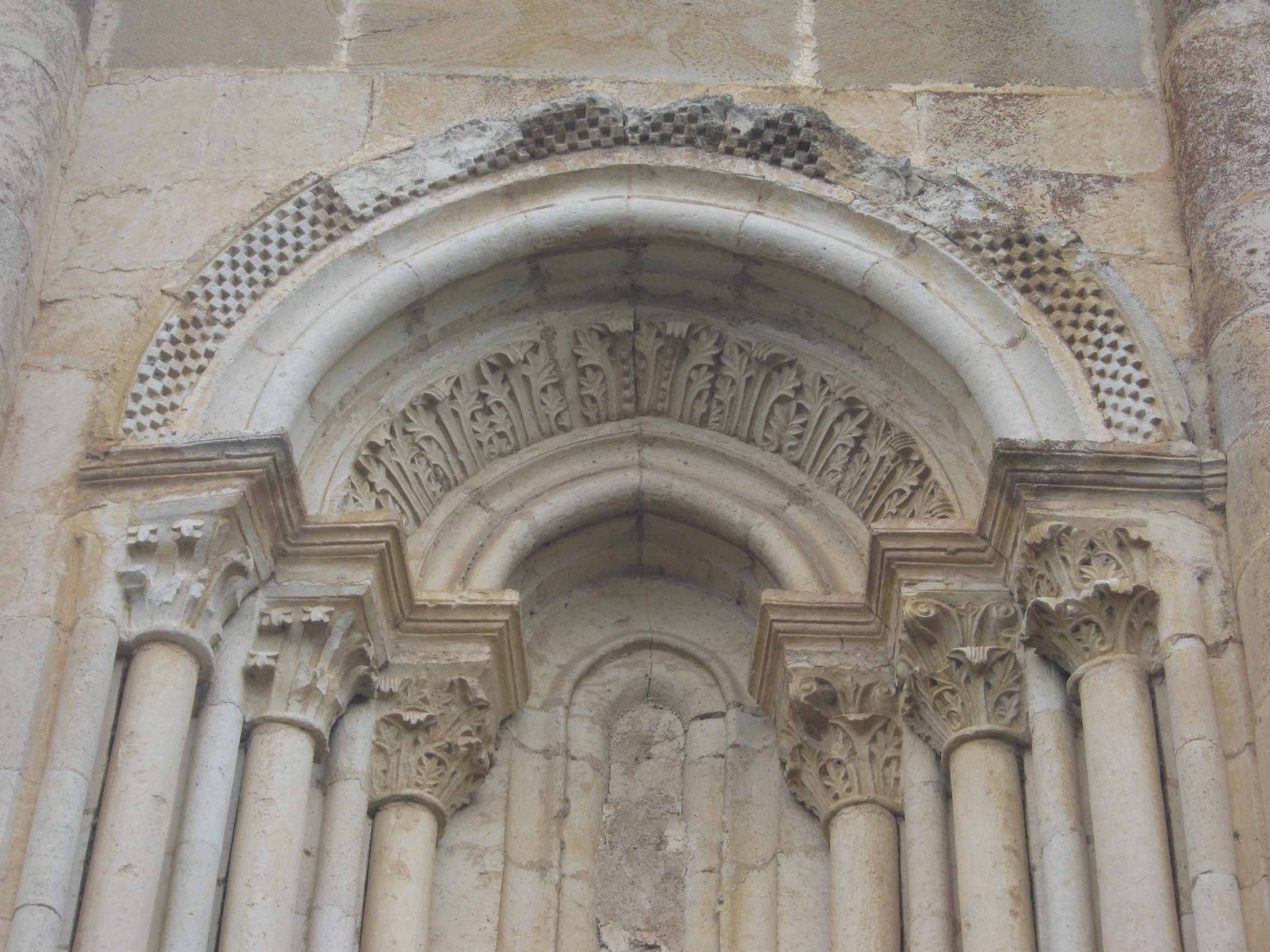 Detalle de un ventanal de la iglesia de Hueto Abajo (Vitoria-Gasteiz, Álava, España).